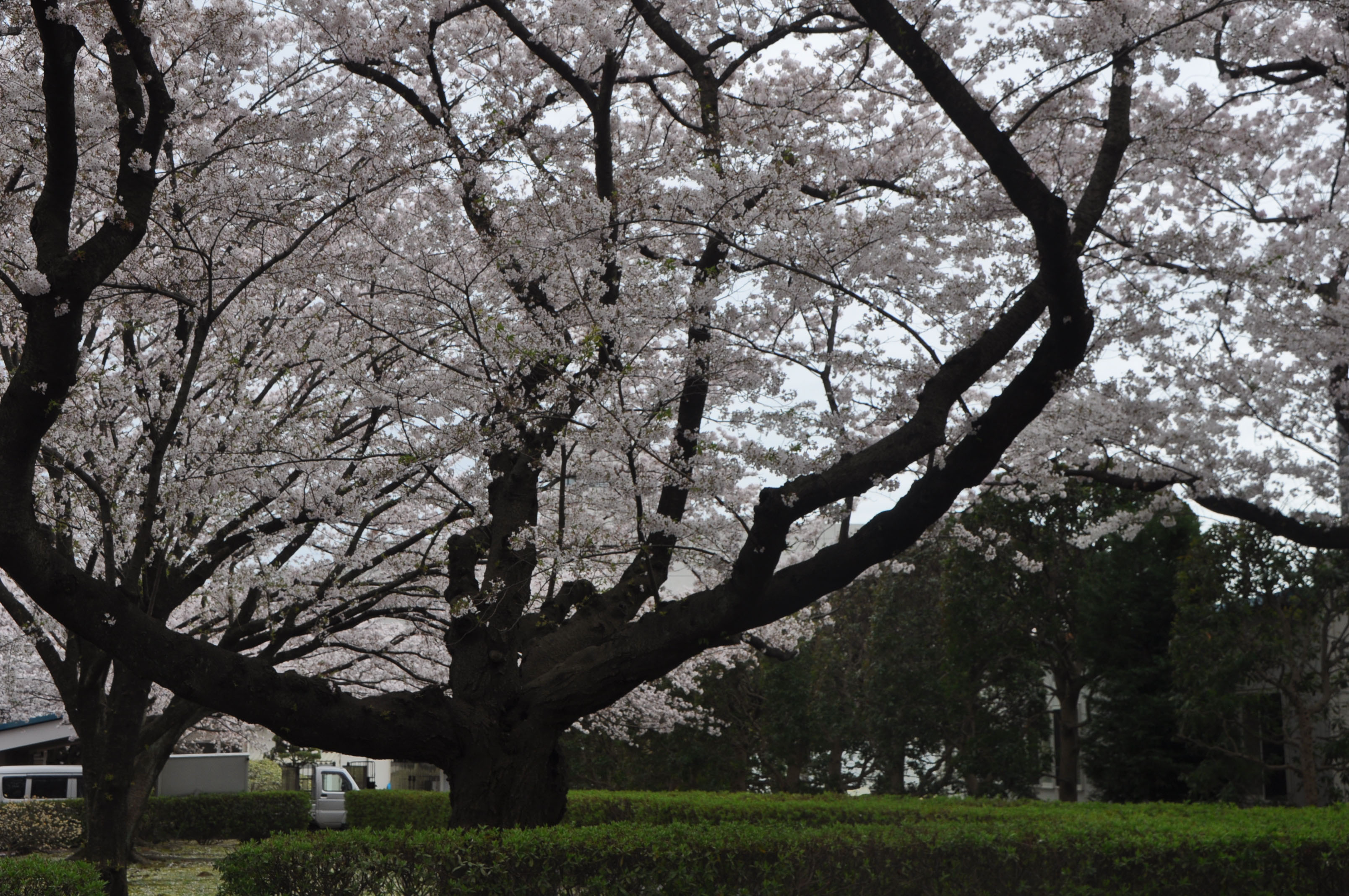 Cherry Blossoms 1 at National Printing Bureau's Odawara Plant, Kanagawa, Japan